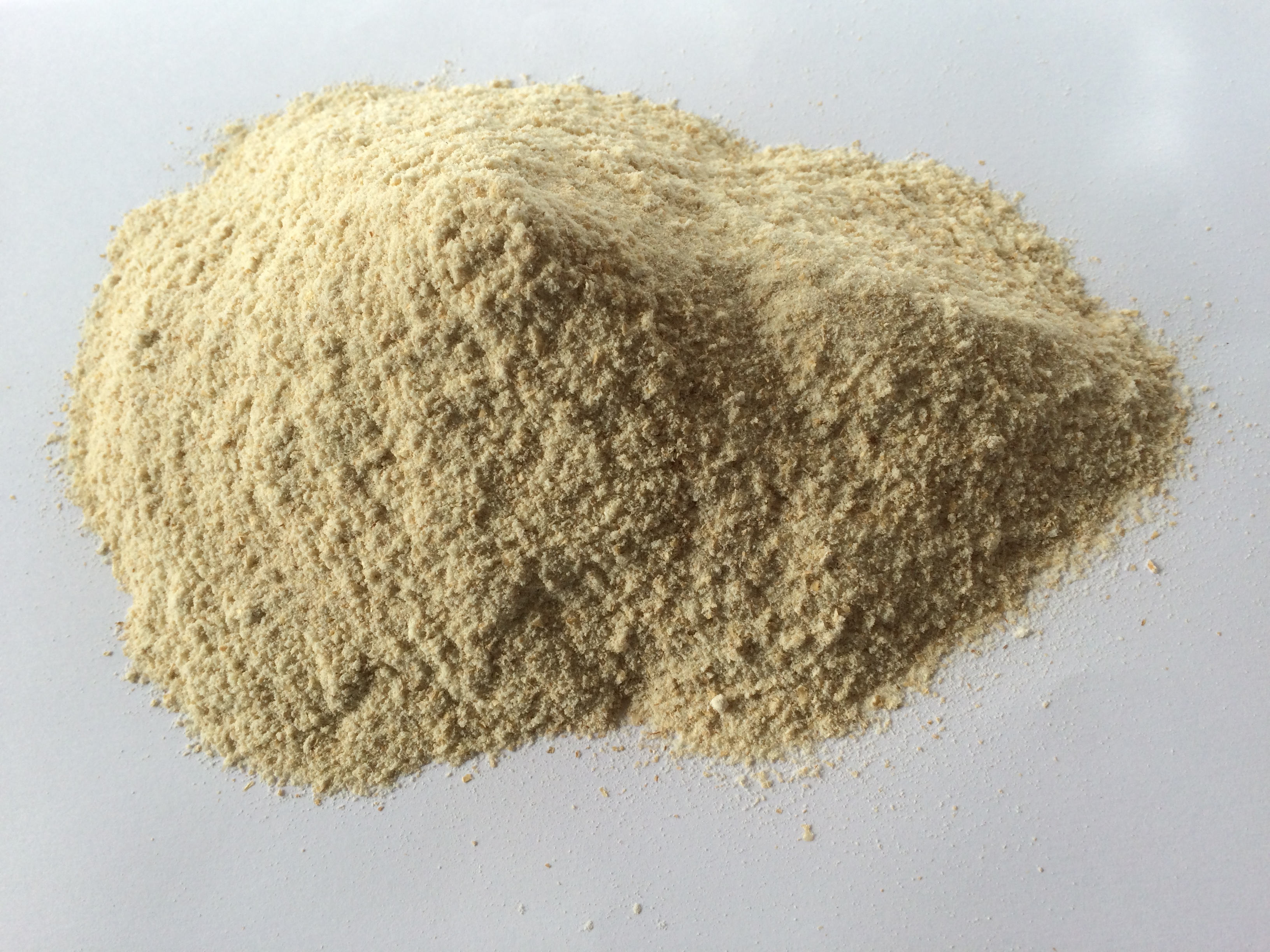 Farina di grano Timilia